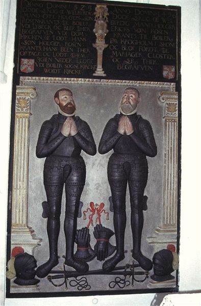 Hornslet Kirke i Danmark. Mindesten over Otte Holgersen og Holger Eriksen Rosenkrantz Boller